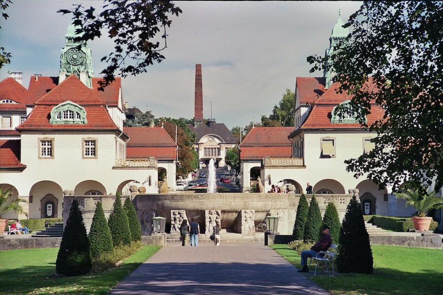 Sprudelhof Bad Nauheim, Hessen, Germany